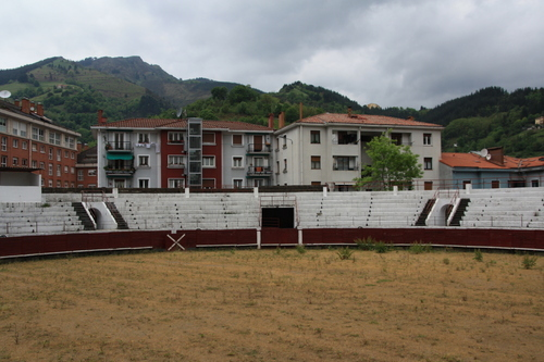 Plaza de toros de Eibar